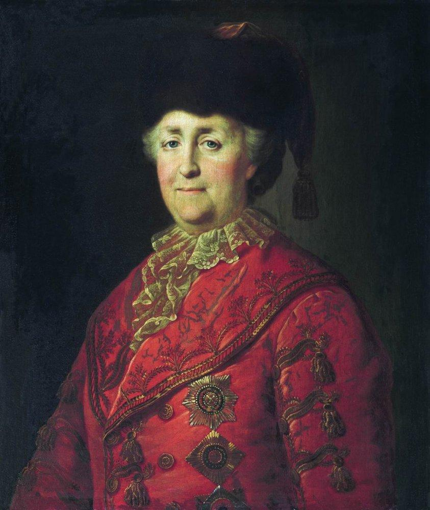 Портрет императрицы Екатерины II в дорожном костюме // ШИБАНОВ Михаил. 1787. Холст, масло. 70x59 см. Дворец-музей, Гатчина. Поступил в 1926 из Государственного Эрмитажа. Ранее – Зимний дворец (Романовская галерея).